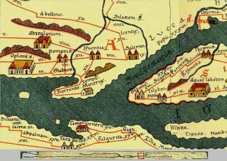 TabulaPeutingeriana, 1-4th century CE. Facsimile edition by Conradi Millieri, 1887/1888 (particolare)